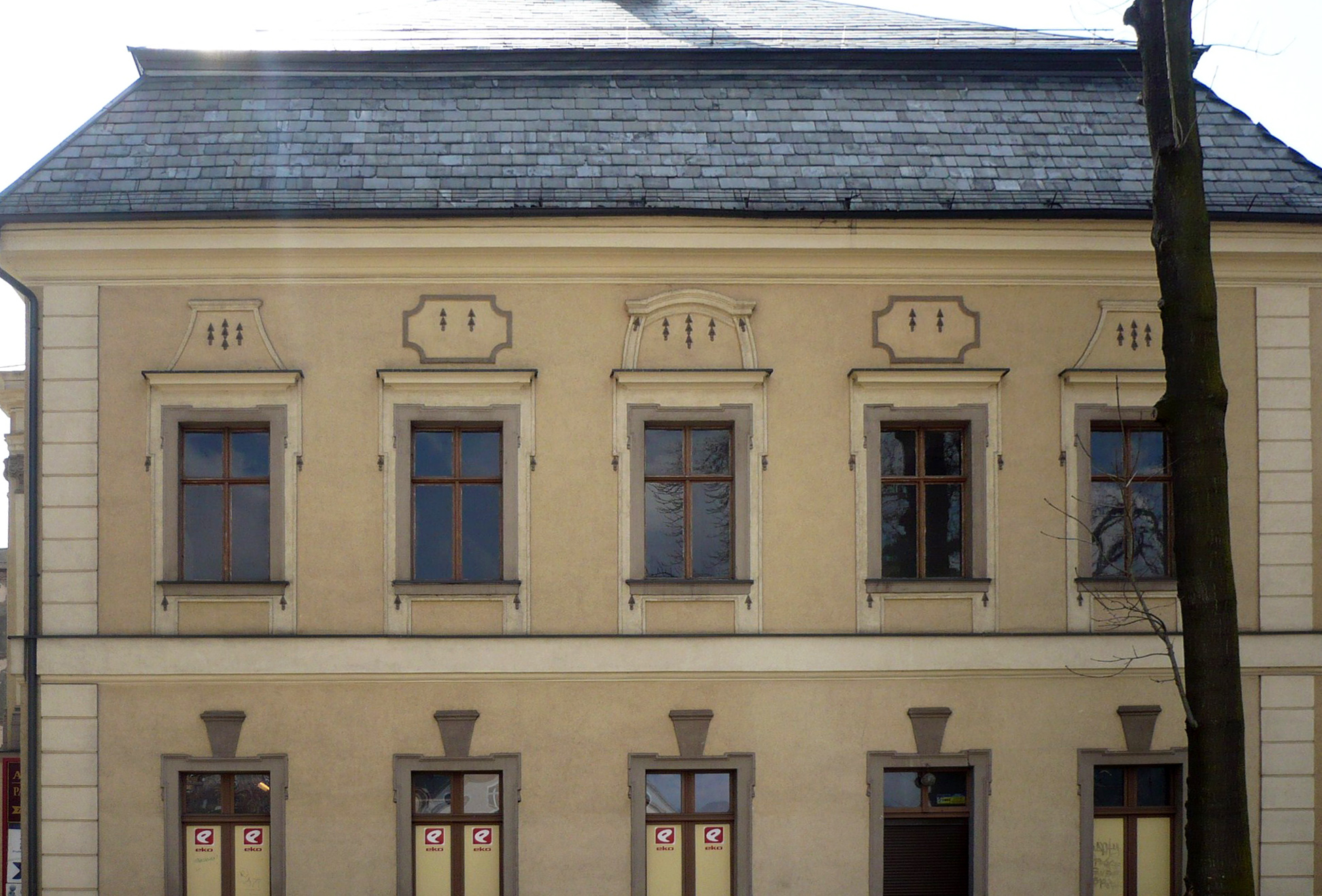 Nowa Ruda, ul. Piłsudskiego 2 - skrzydło zamku Stillfriedów, obecnie biura, 1416, 1650, 1730 (zabytek nr A/935/1559 z 16.03.1966)